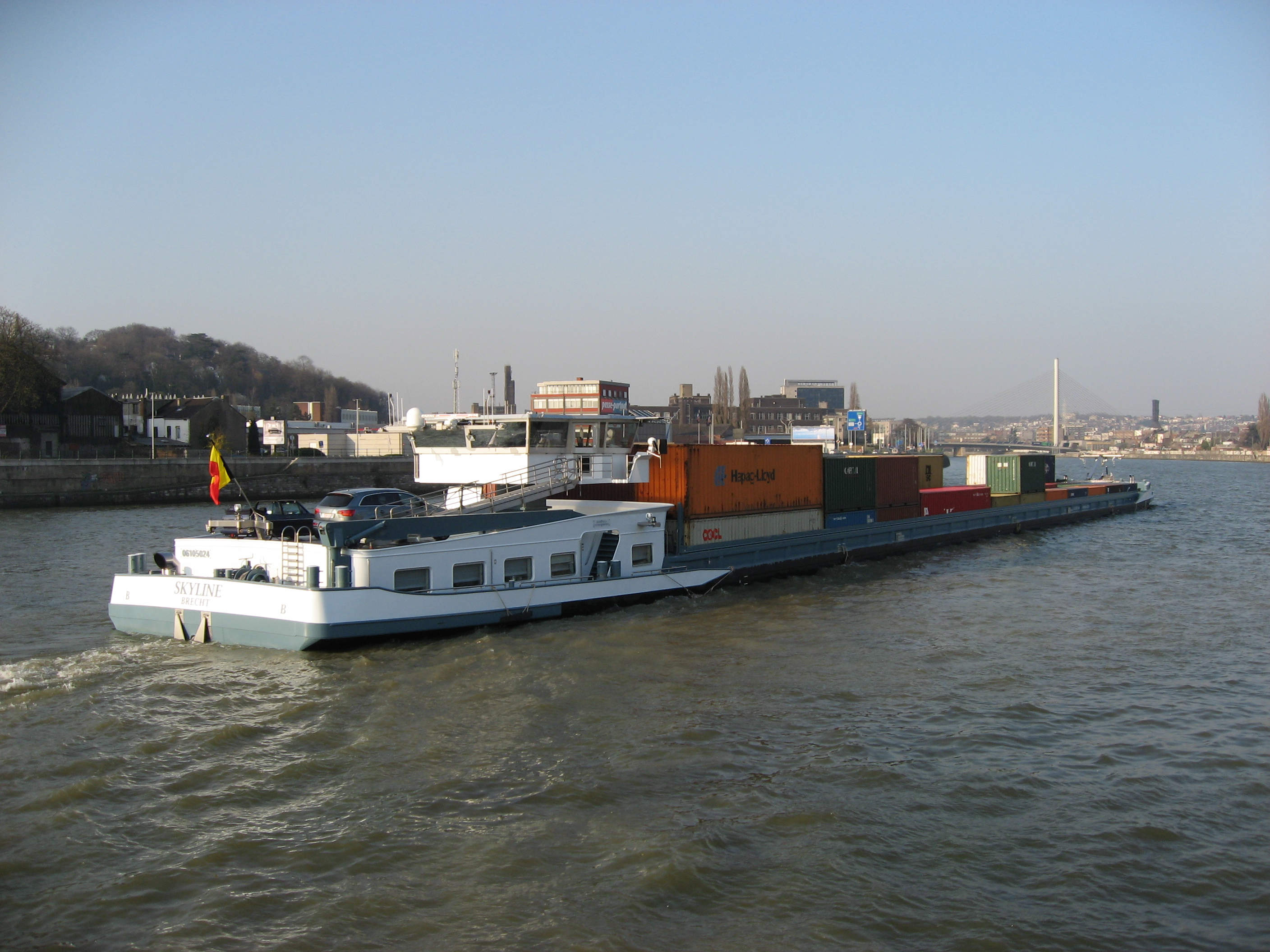 Barge 3 niveaux au départ du terminal du port de Renory